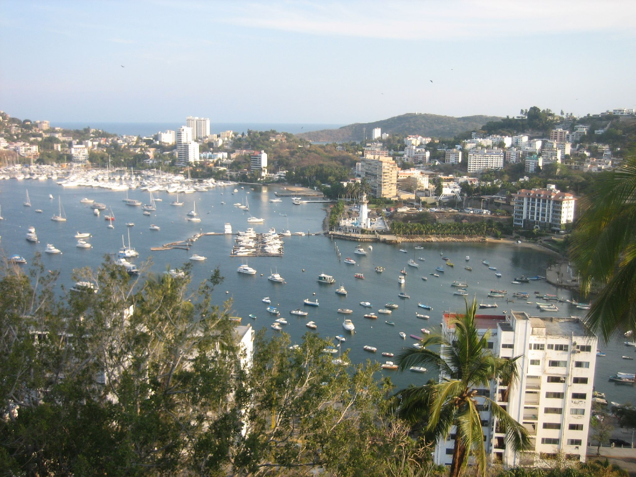 Área turística del Acapulco Tradicional o Náutico en Acapulco, Guerrero, México.